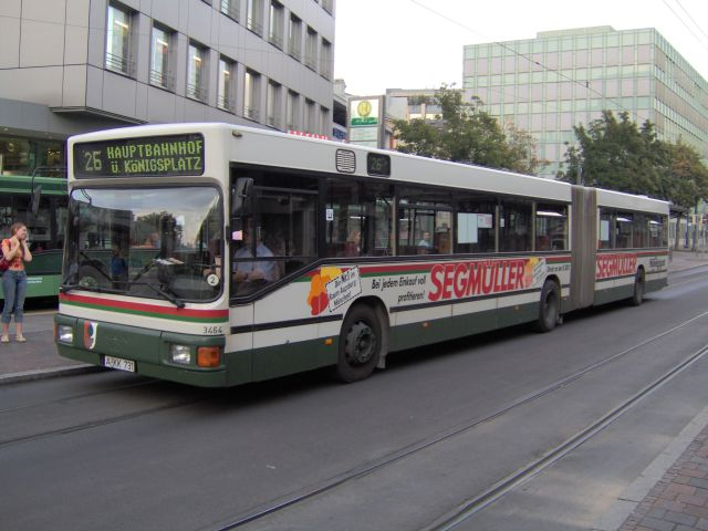 MAN NG 272 Niederflurgelenkbus, Baujahr 1993; 36 Stück (3455 - 3490). Wagen Nr. 3464, ein Dieselniederflurgelenkbus, mit Segmüller Werbung am Augsburger Hauptbahnhof.